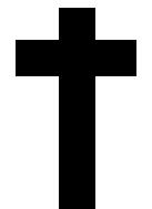 Het Latijns (of christelijke) kruis; zelf gemaakt in paint